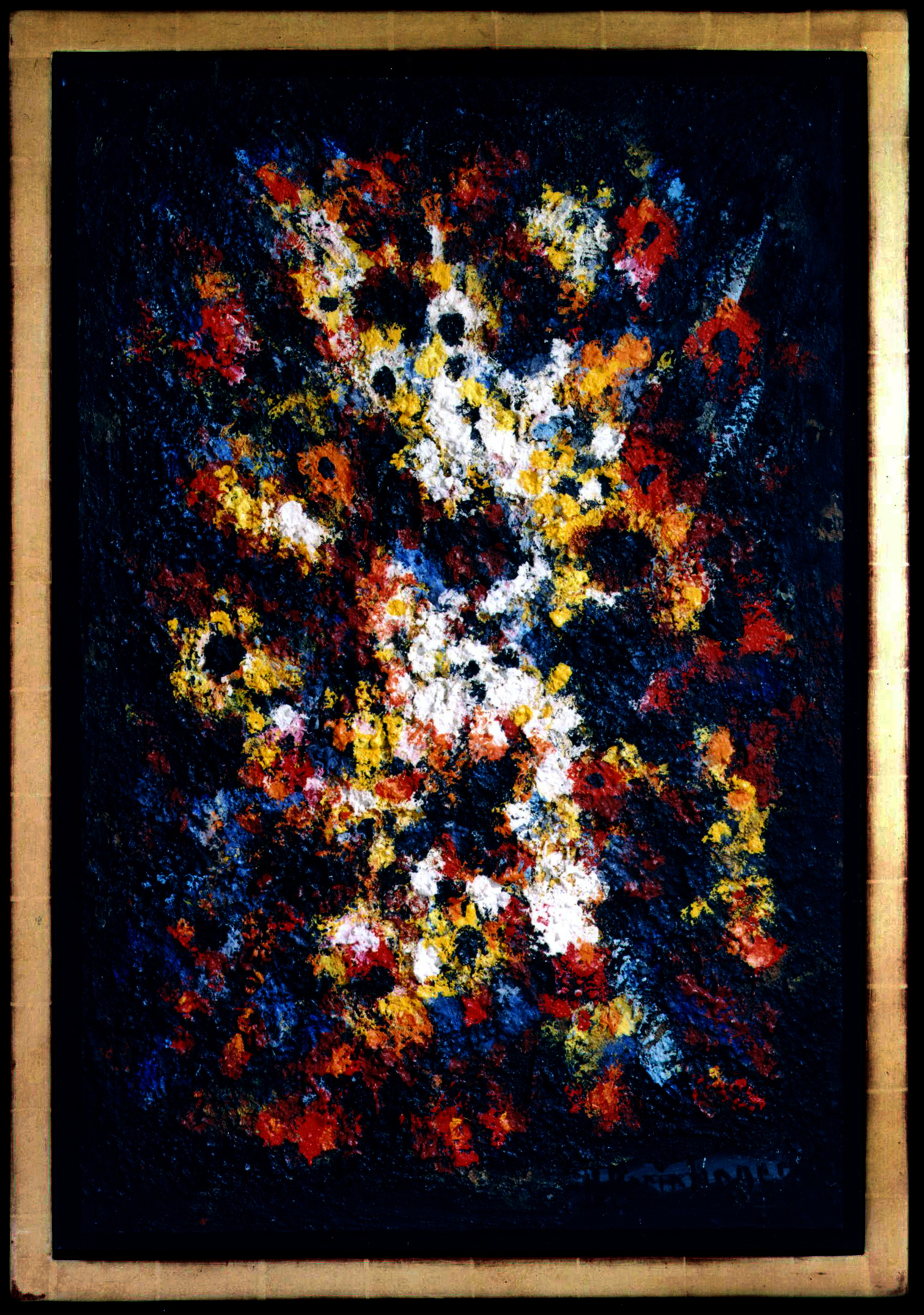 Urknall